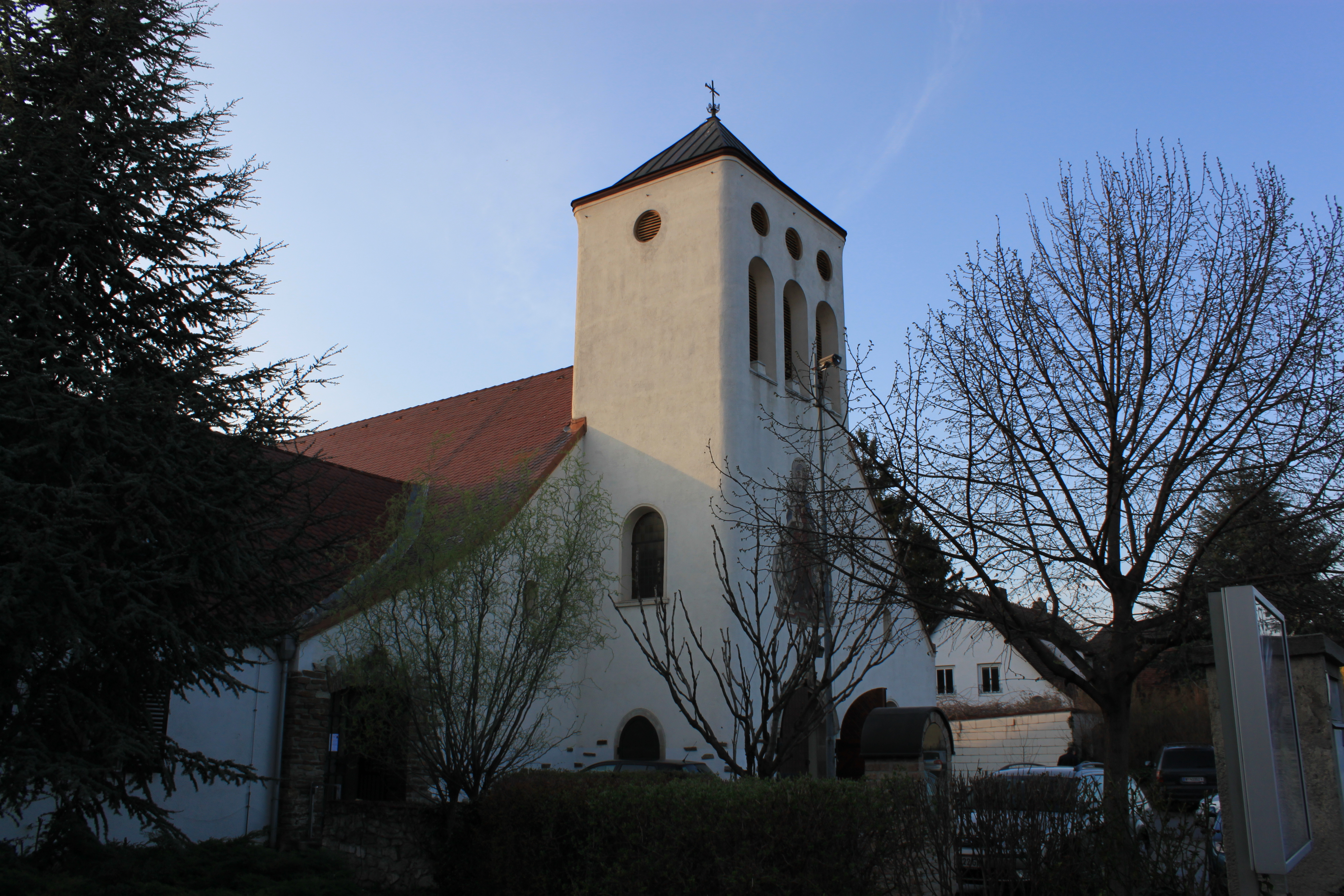 Pfarrkirche Herz Mariä in Leopoldsdorf bei Wien